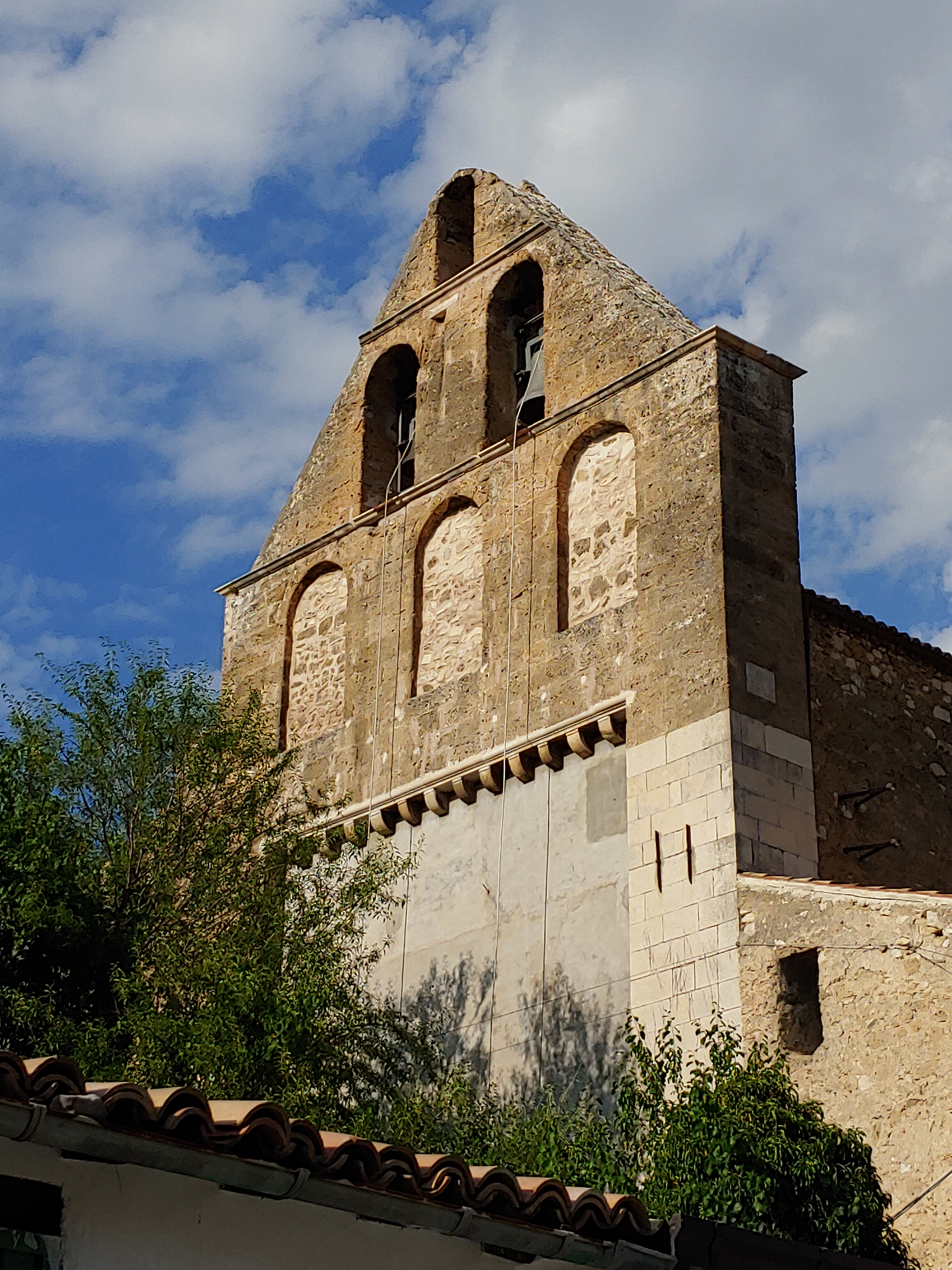 Il campanile è formato da tre celle (due sotto ed una piccola sopra le due) poste in una struttura a triangolo situata su una base con altre 3 celle (più grandi delle precedenti) murate. Esso risale al 1526, mentre la base su cui esso poggia è originaria della struttura del 1317. Esso è posto sul retro della chiesa, non è quindi visibile a chi si trova davanti l'entrata principale, bensì esso è visibile proseguendo in via Ramai andando sul lato sinistro della chiesa.